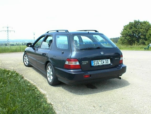 Honda Accord Aerodeck (1993-1997 Typ CE2)